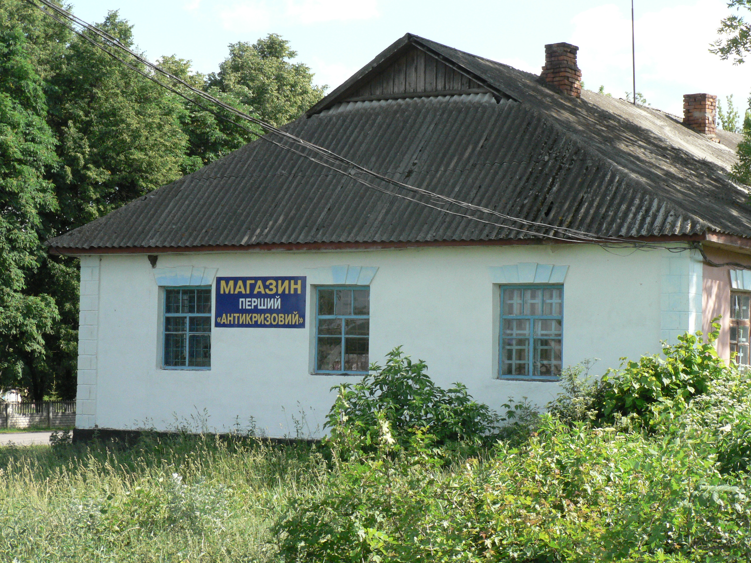 Перший Антикризовий магазин в с. Дзвониха